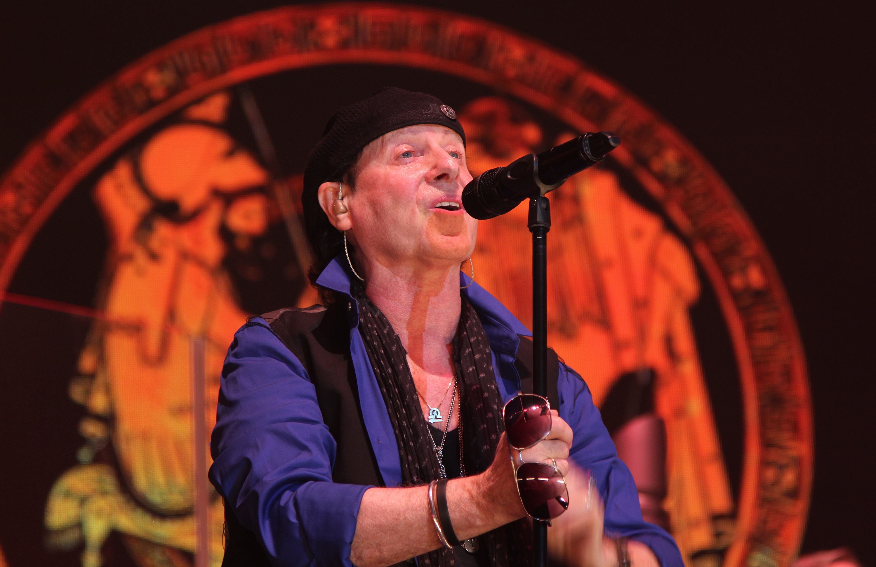 Klaus Meine - Scorpions Unplugged April 2014